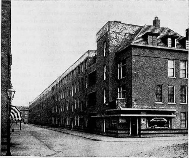 Rotterdam, Spangen, woningblok VIII (Potgieterstraat - Van Lennepstraat - Van Harenstraat - Pieter Langendijkstraat) van architect J.J.P. Oud, zijde Pieter Langendijkstraat. Foto afkomstig uit Bouwkundig Weekblad, 44e jaargang, nummer 35 (1 september 1923): p. 377.